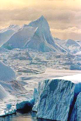 Ilulissat Eisfjord, Grönland